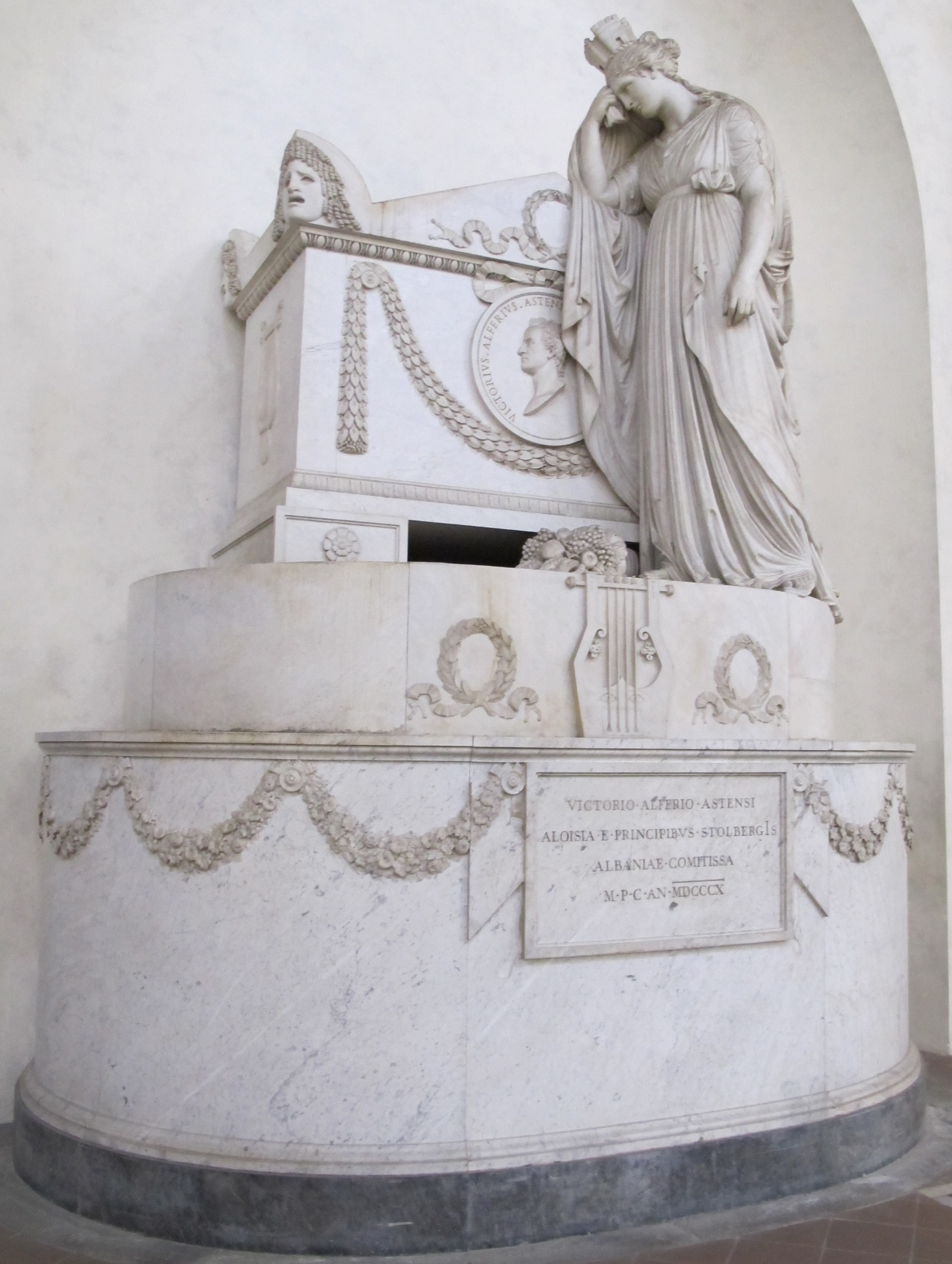 S. croce, tomba vittorio alfieri